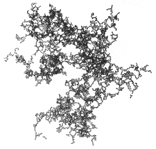 Image microscope d'une feuille d'or. On y distingue aisément des colloïdes d'or. Utilisation dans Dendrite